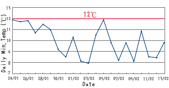 hongkongmintemp